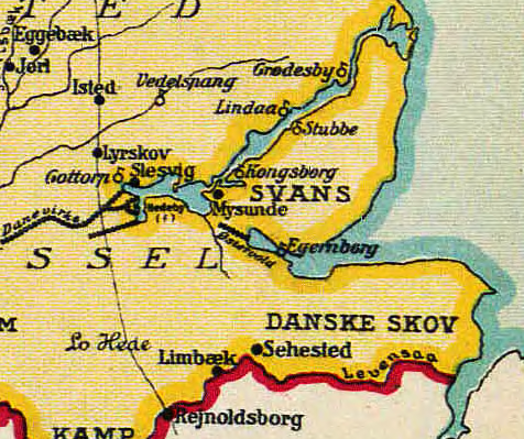 Detail fra Gustav Rosendal - Sønderjylland i middelalderen, fra 1913